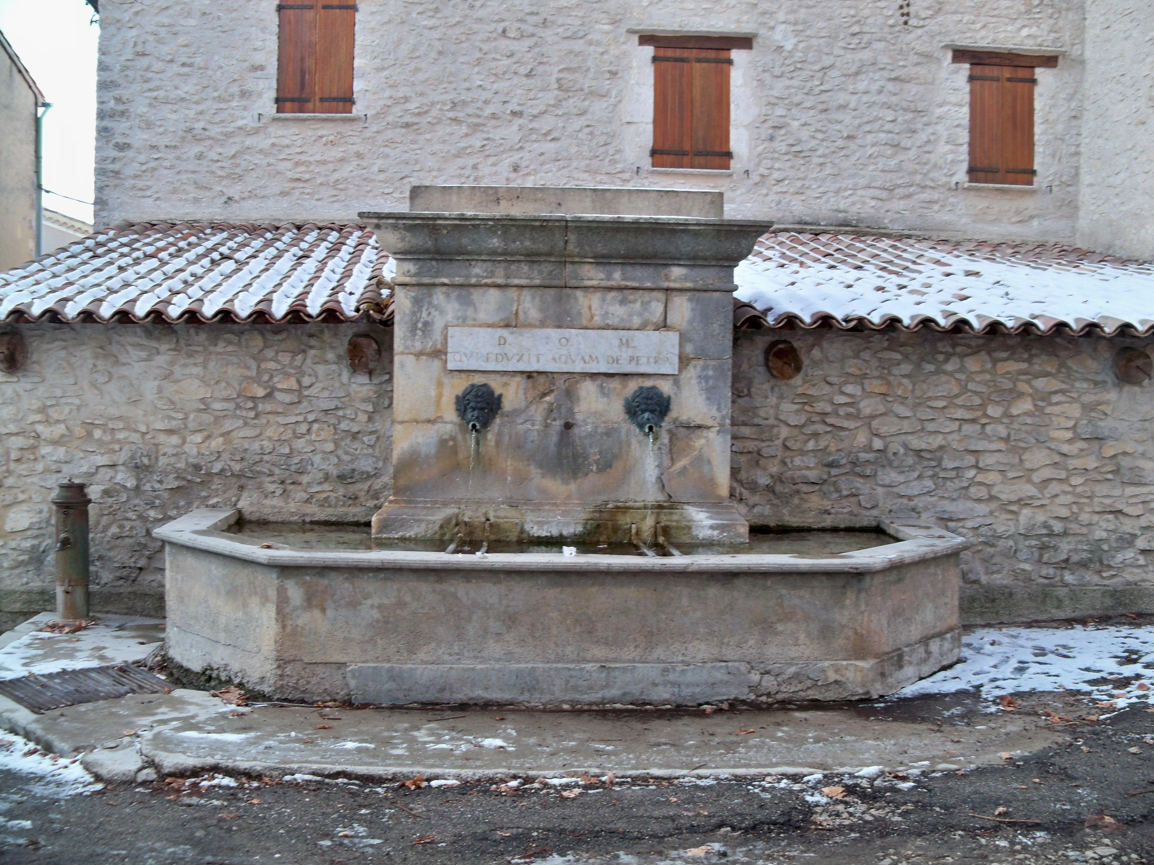 fontaine publique à Revest-du-Bion (04)